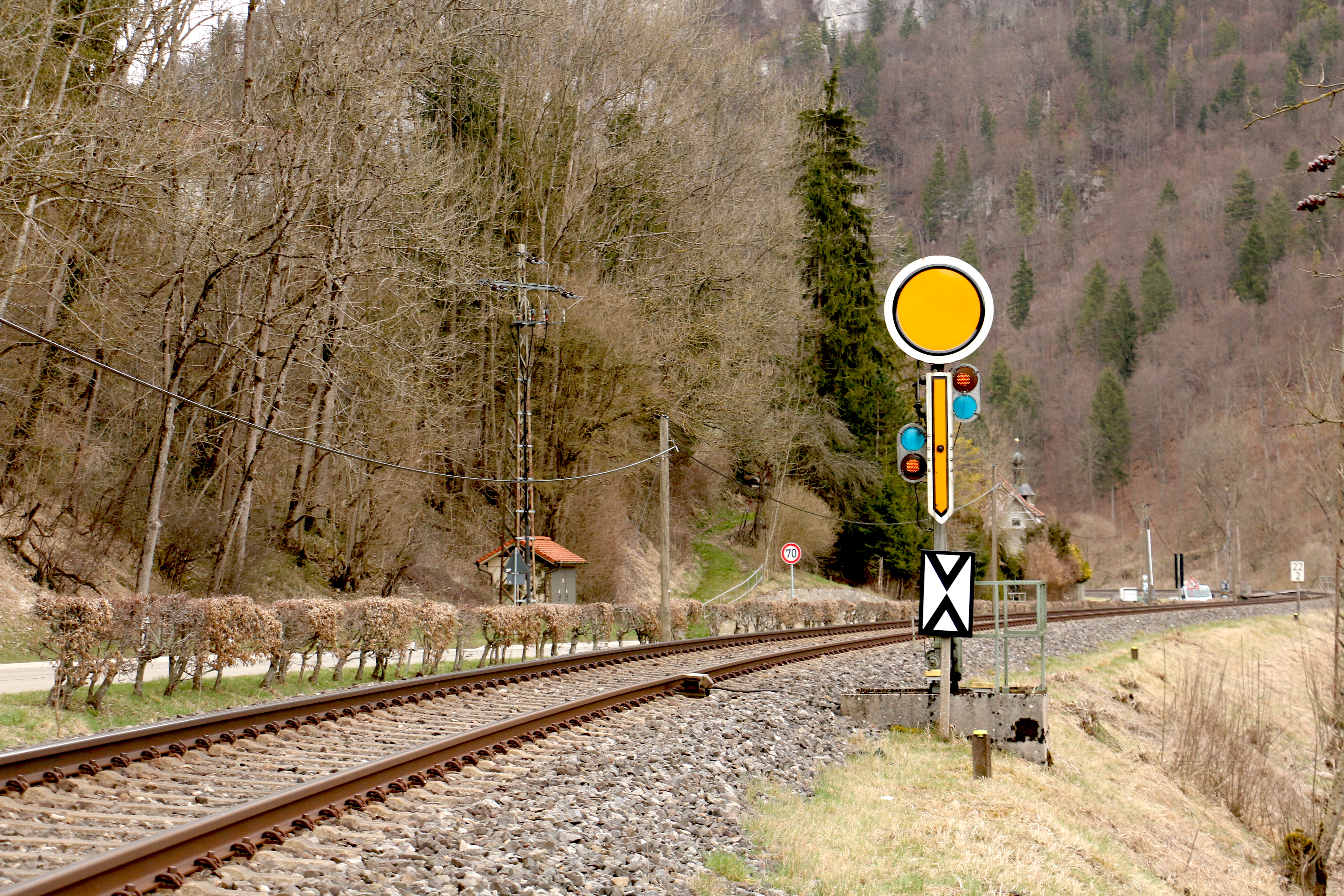 Vorsignal zum Einfahrsignal von Hausen im Tal (2018)